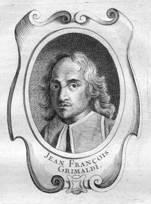 Portrait of Giovanni Francesco Grimaldi (1606-1680)